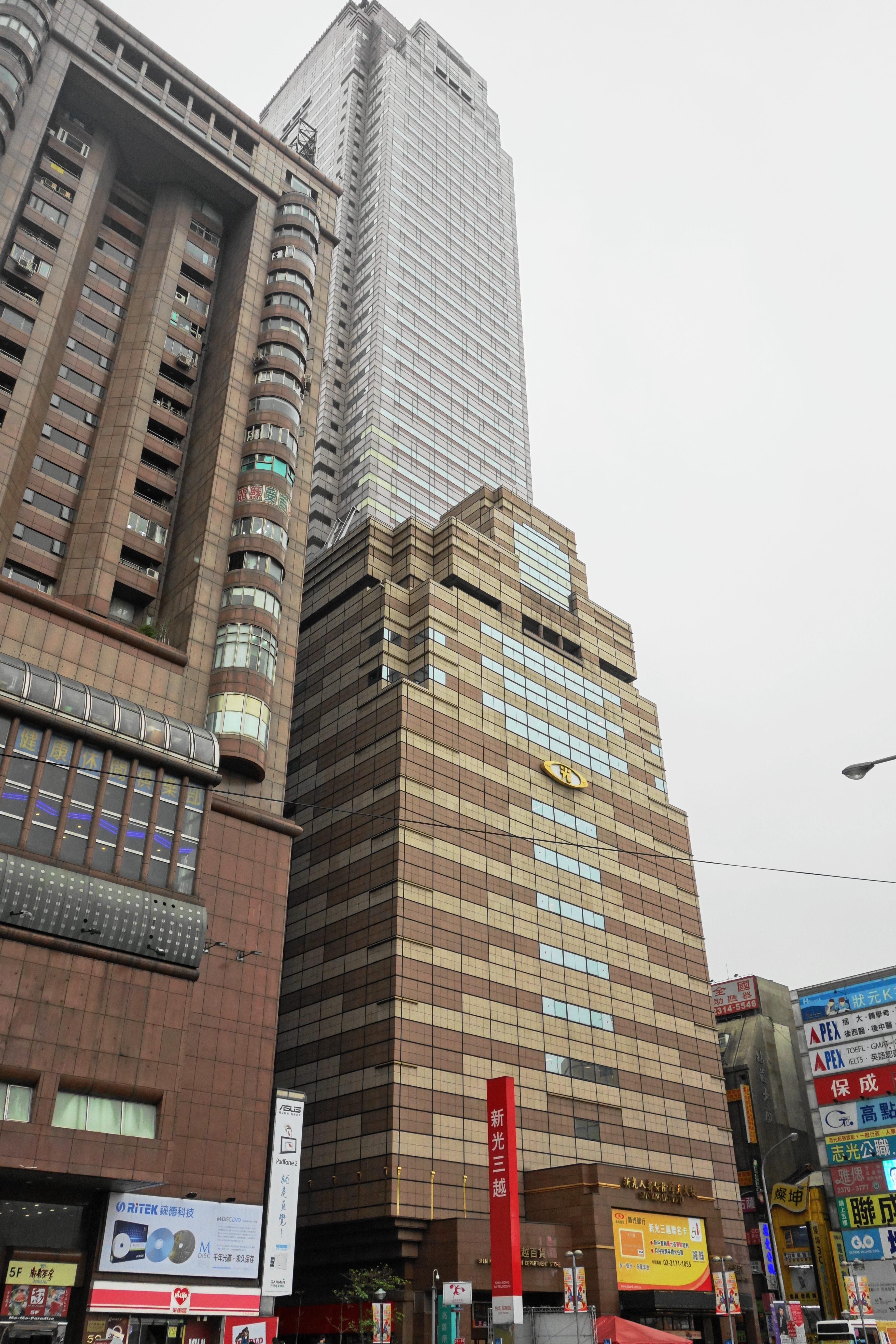 新光人壽保險摩天大樓。